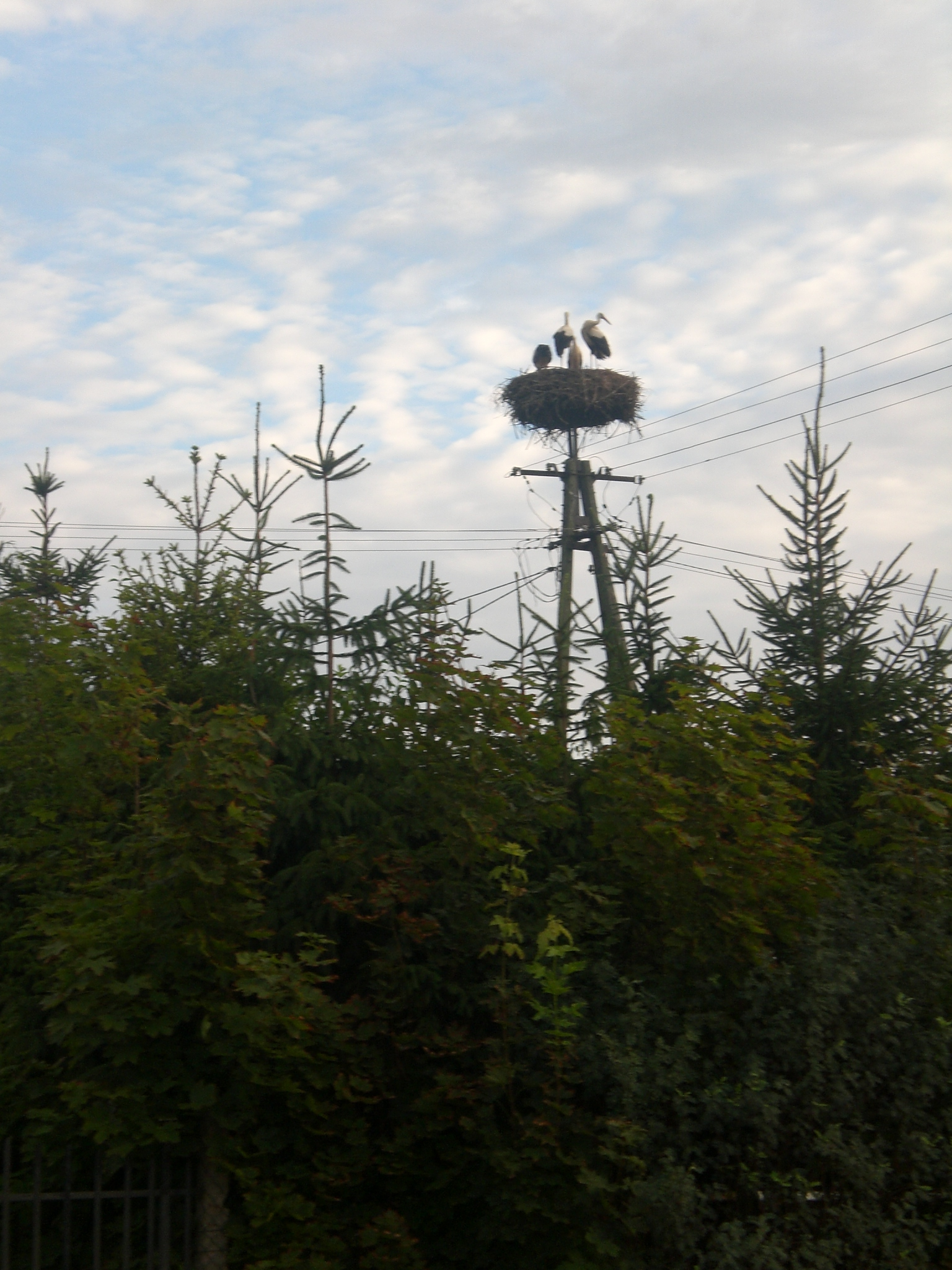 Bytonia